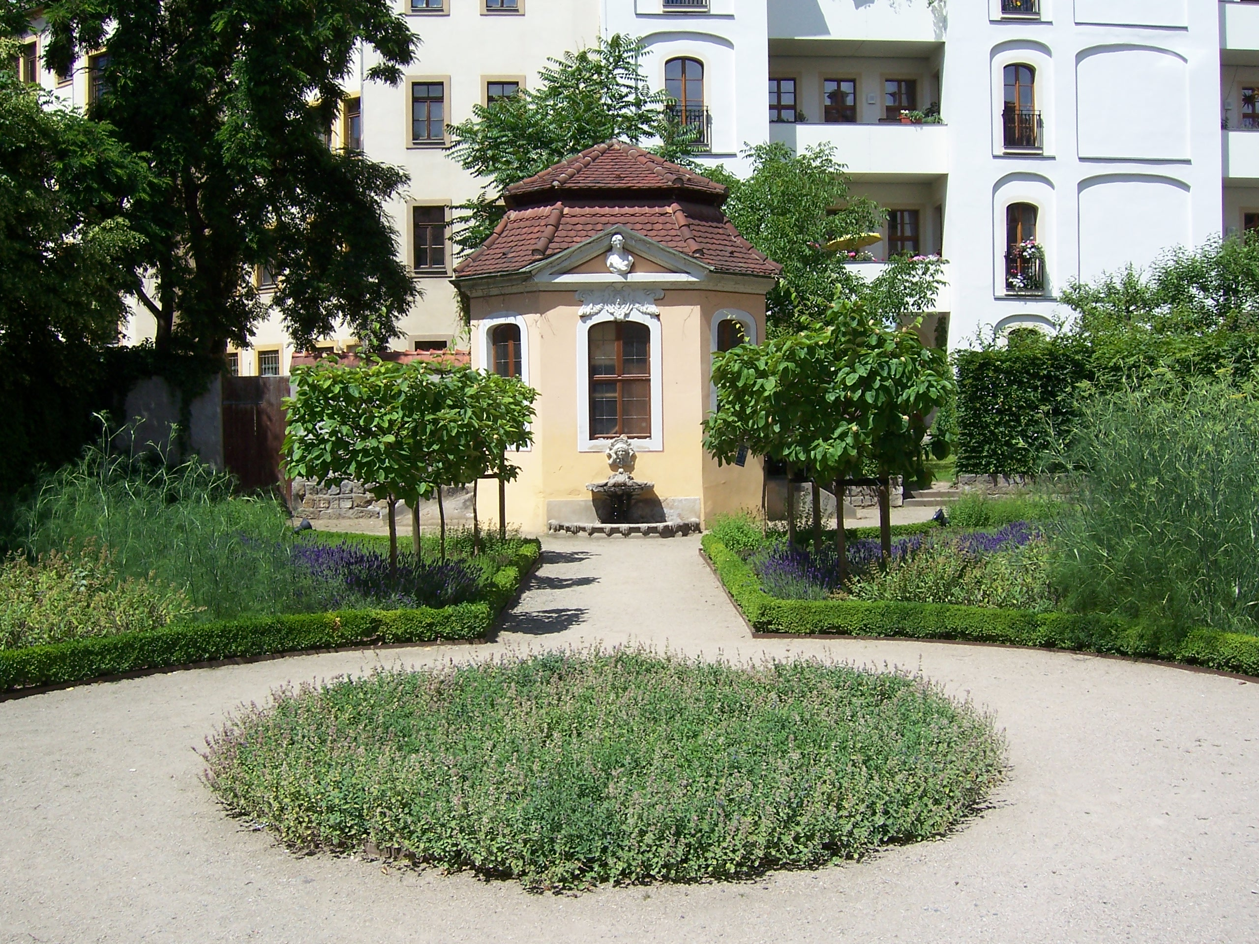 Pavillon von Johann Benjamin Thomae im kleinen Barockgarten des Societaetstheaters Dresden, der früher Thomae und Johann Gottfried Knöffler gehört hatte.